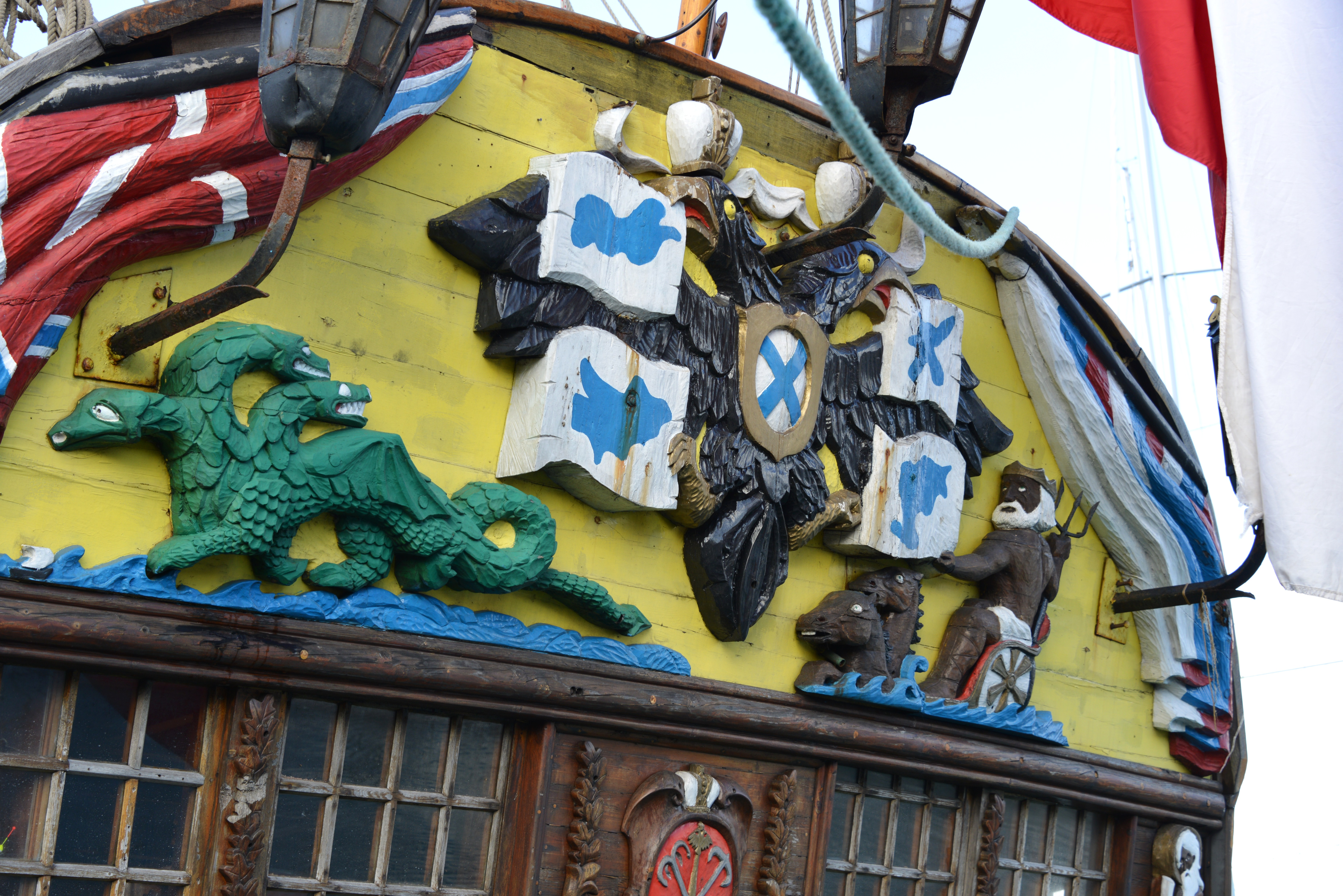 Détails du château-arrière de la frégate russe Shtandart (Штандартъ) amarrée au Quai d’ Honneur dans le Bassin des Chalutiers lors de son escale à La Rochelle en octobre 2013. La Rochelle, Charente Maritime, France.